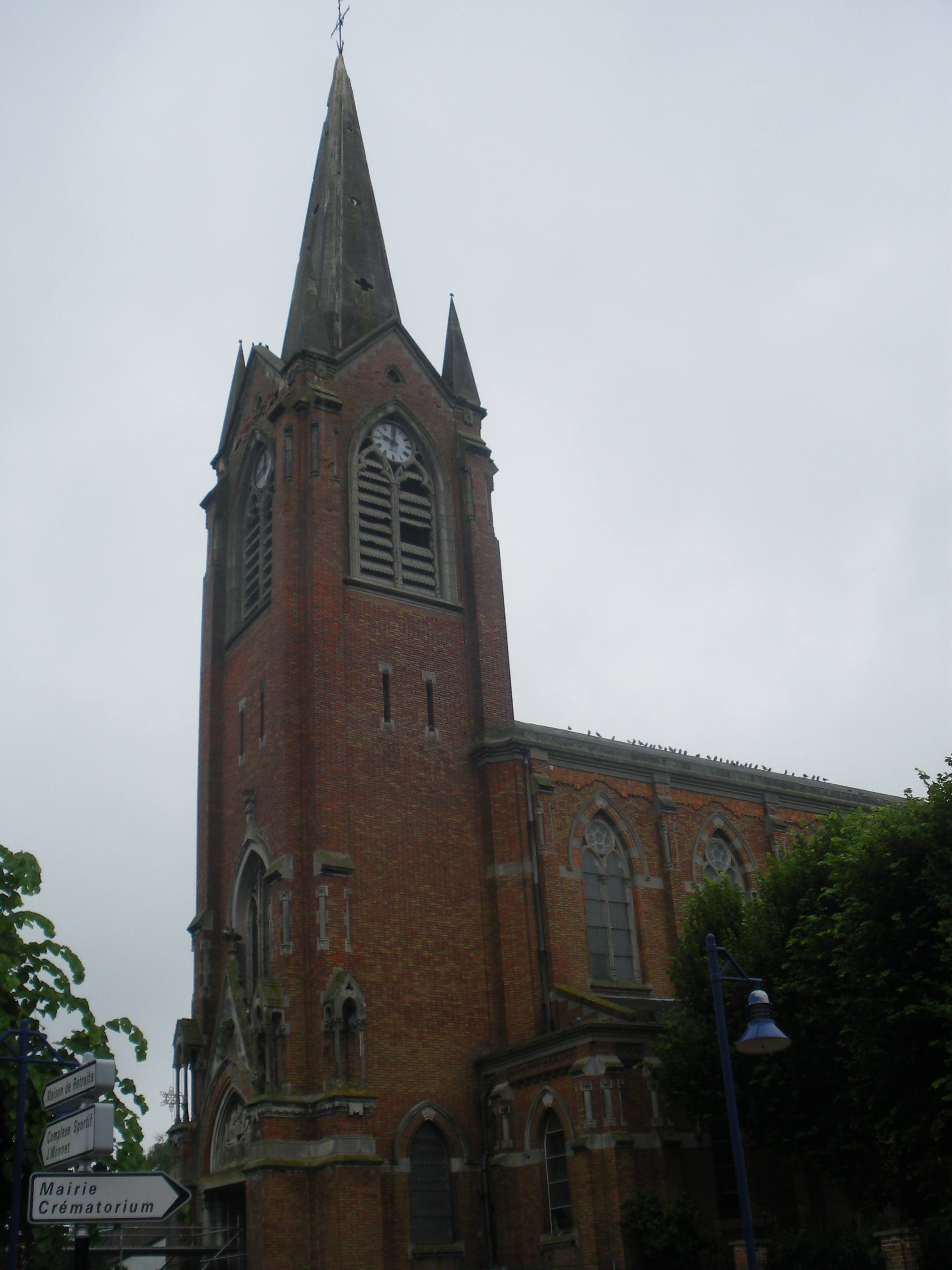 Vue de l'église d'Herlies.